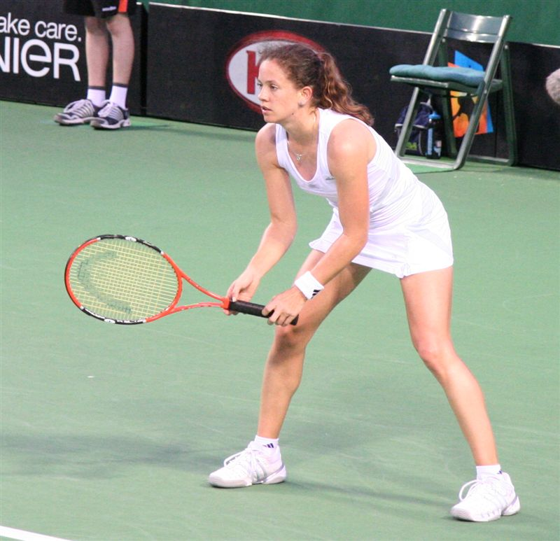 Patty Schnyder